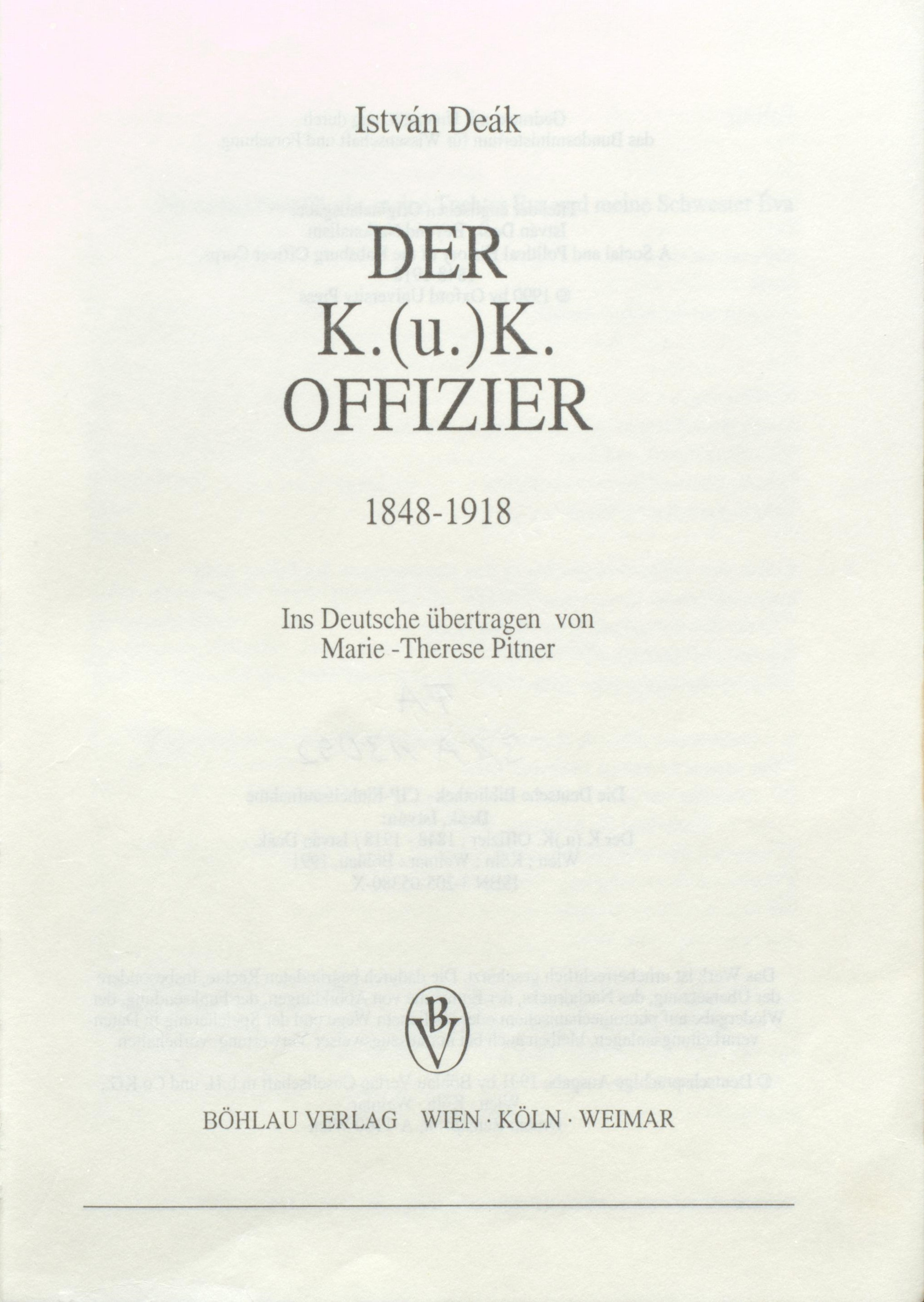 István Deák Der K.(u.)K. Offizier 1991 Titel